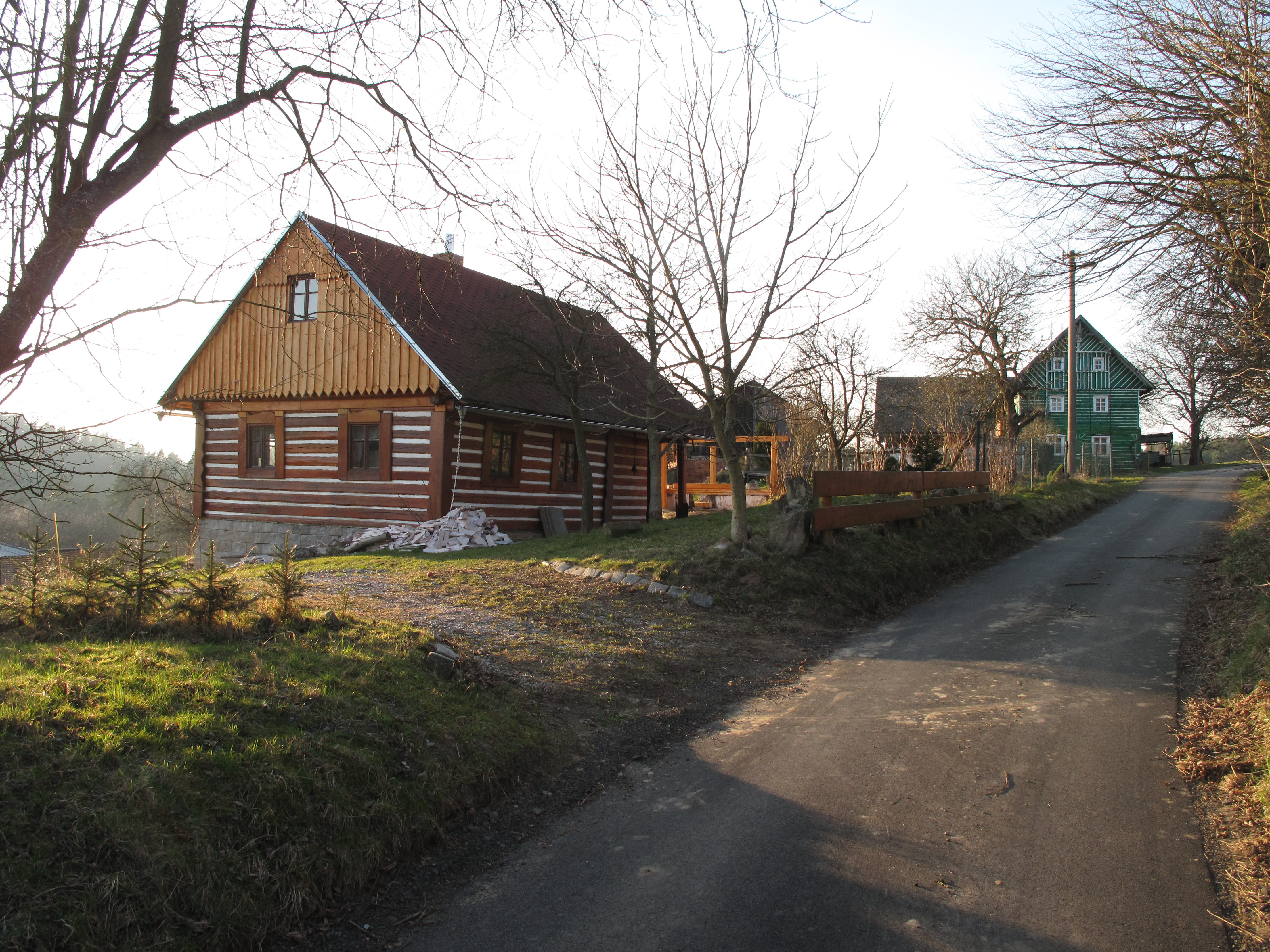 Roubenka v Nesvačilech. Okres Liberec, Česká republika.